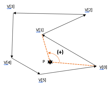 Algoritmo radial. Sentido positivo del ángulo de barrido.